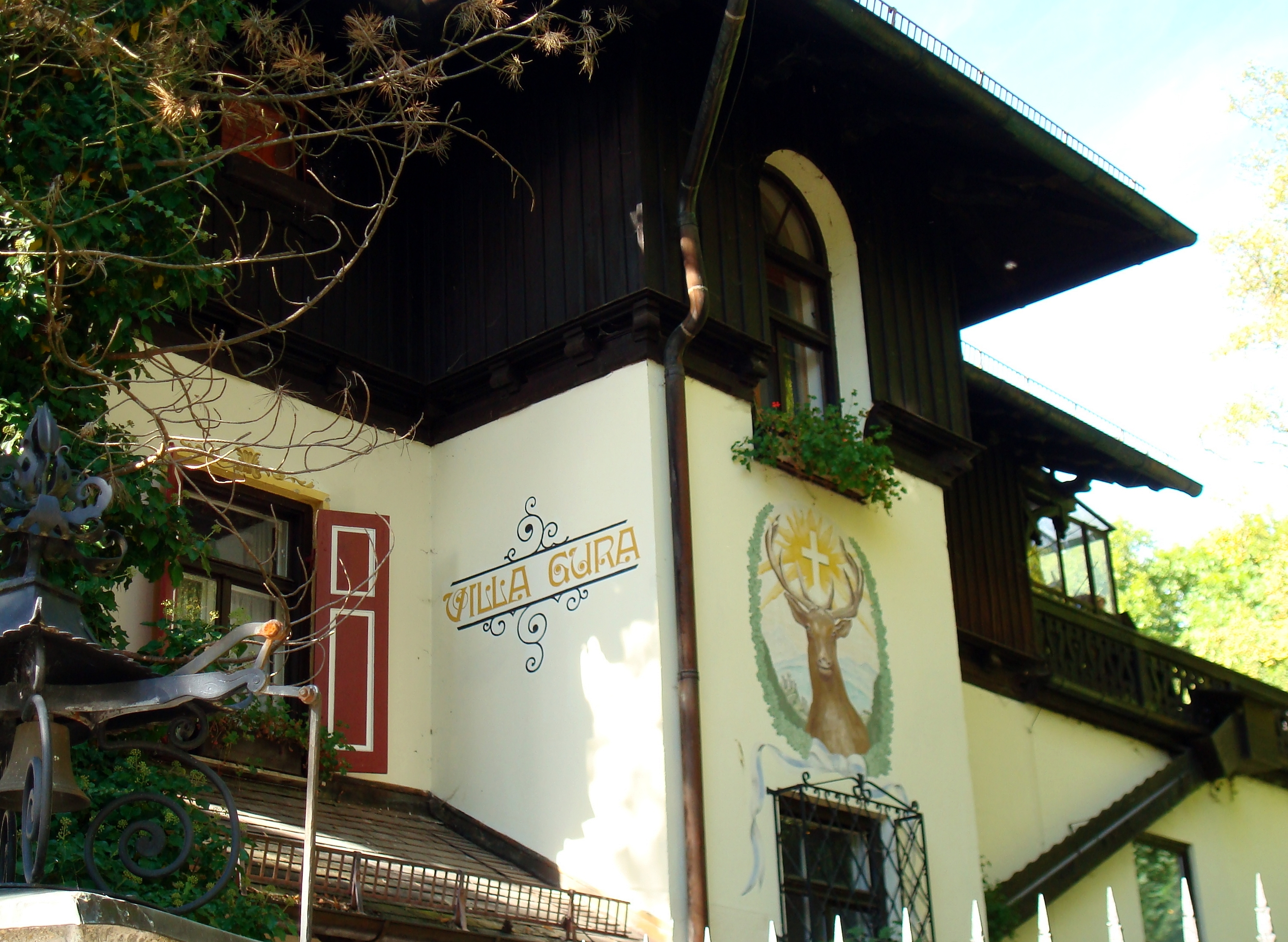 Villa Gura, 1881 für den Kammersänger Eugen Gura errichtet. Nach den Plänen des Künstlers entstand ein zweigeschossiger Halbwalmdachbau mit Loggien, Lauben und einem großem Eckturm. This is a photograph of an architectural monument.